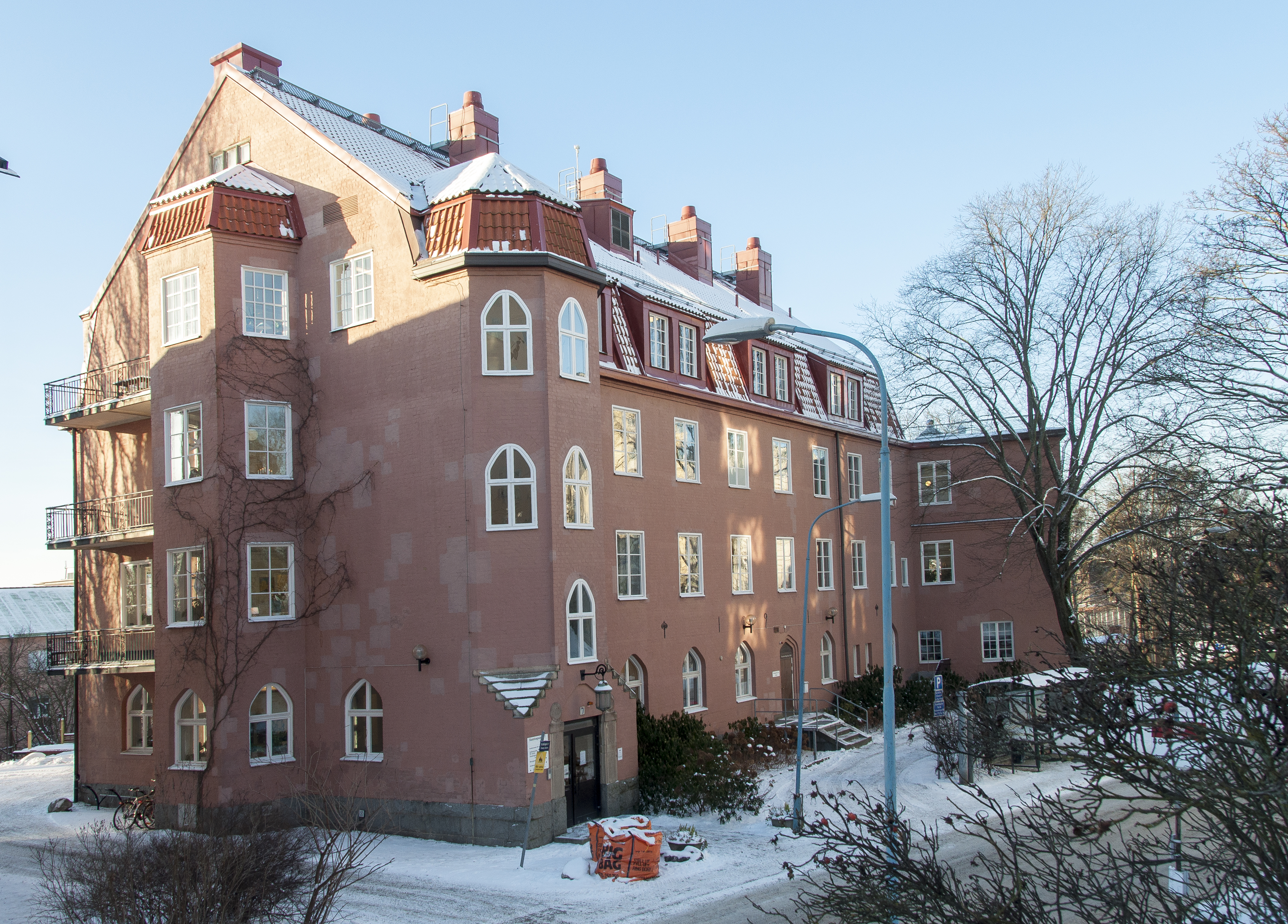 Sällskapet Barnavårds hus, Stadshagsvägen 7, (baksida) Byggnadsår 1915. Arkitekt Rudolf Arborelius